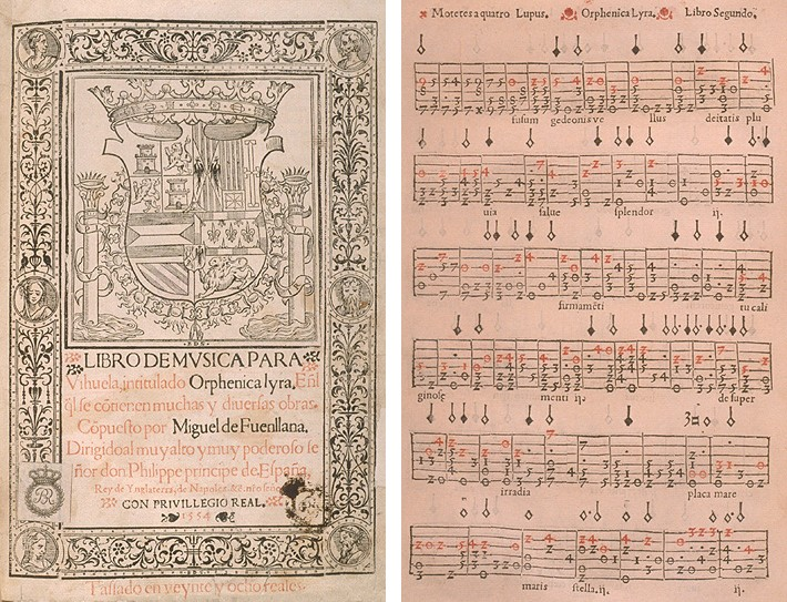 Miguel de Fuenllana „Orphenica lyra” tabulatúrás könyvének címlapja és egy oldala